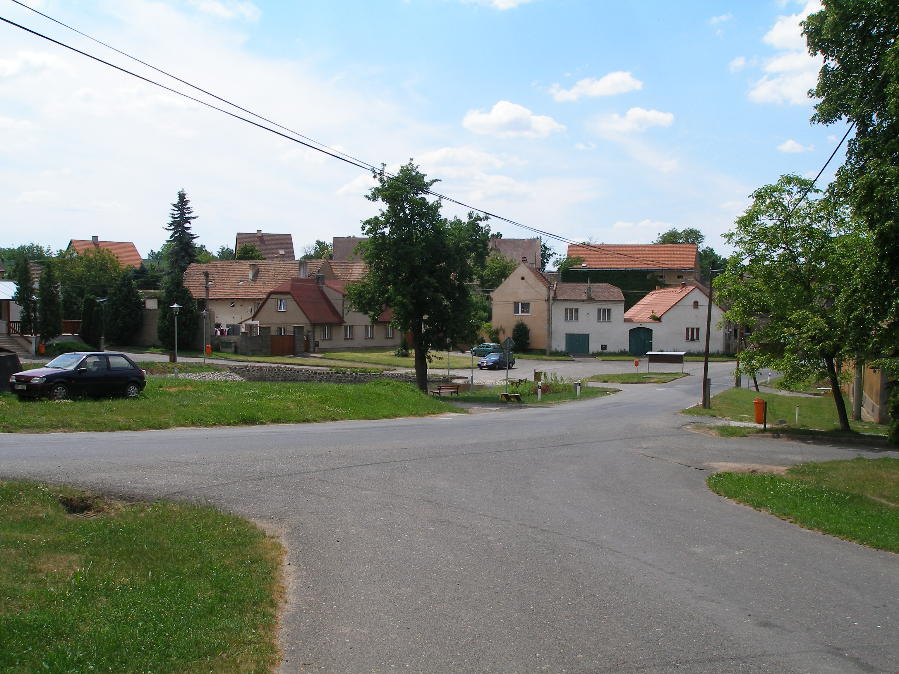 Pohled od památníku obětem světových válek v Žižicích.na místní náves.